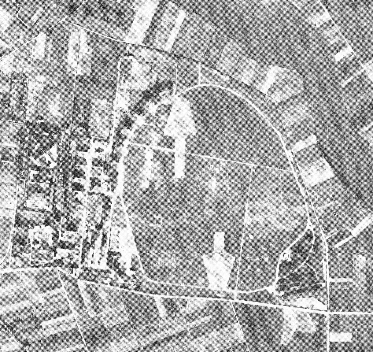 Der nördlich von Werl (links) liegende Fliegerhorst, 1945 aufgenommen von einer Maschine der USAAF. Im Osten am unteren Bildrand die heutige Scheidinger Straße (L 795).